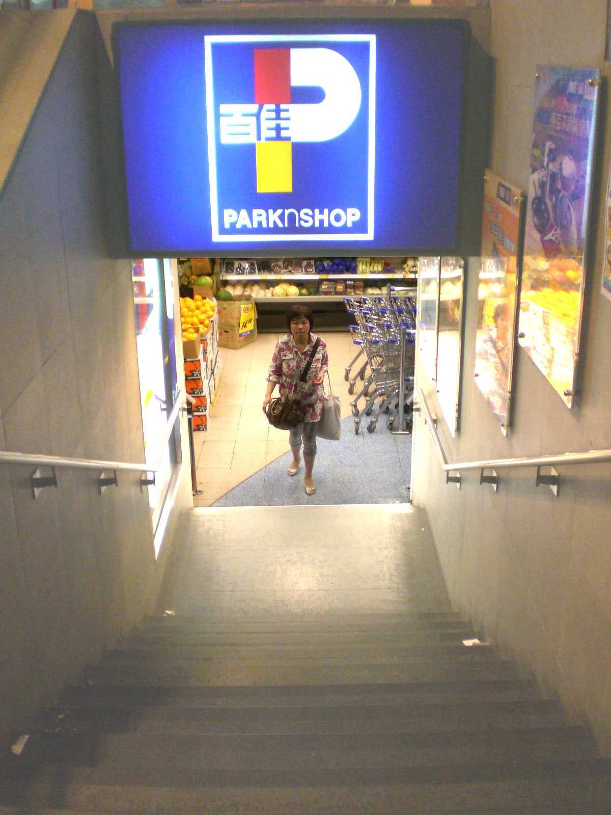 集成中心地庫百佳超級市場